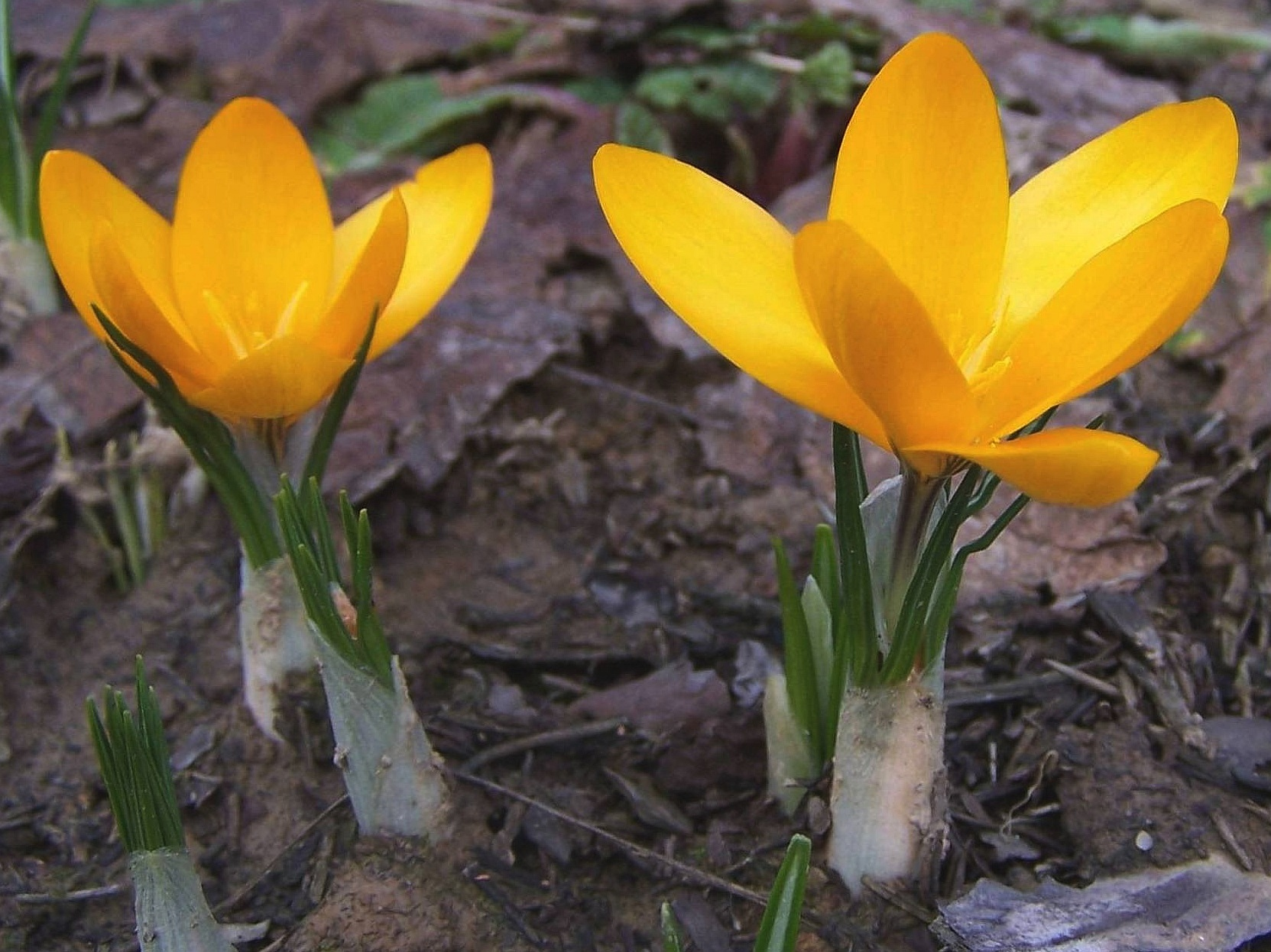 Crocus flavus hort. (syn. Crocus aureus)